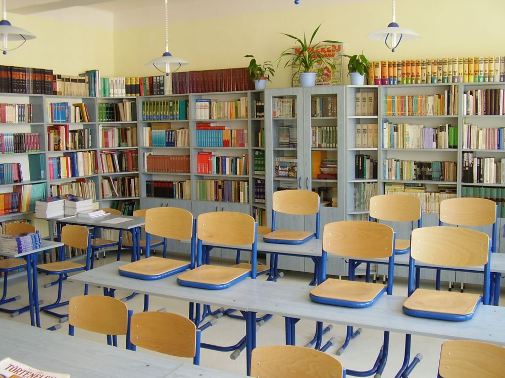 A kazincbarcikai Árpád Fejedelem Tagiskola könyvtára